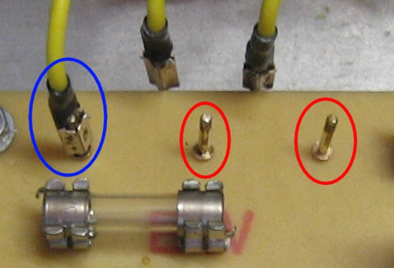 Lötstift